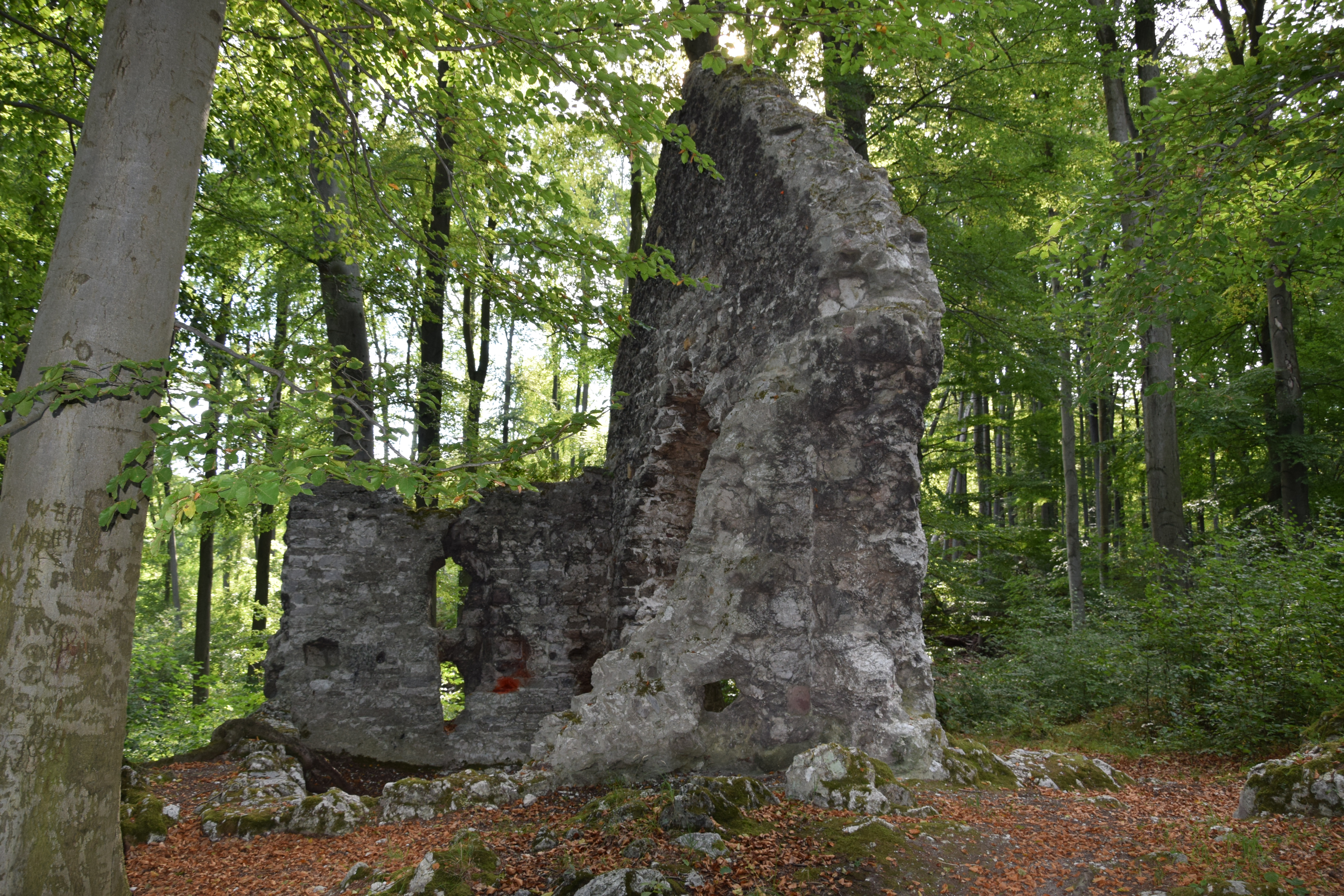 Die Grasburg bei Rottleberode - Chor